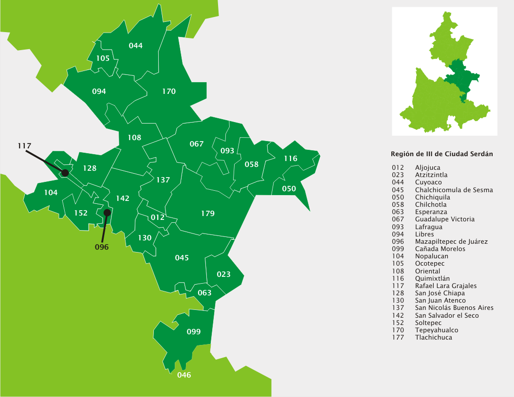 Mapa de la Región III de Ciudad Serdán, Puebla, México